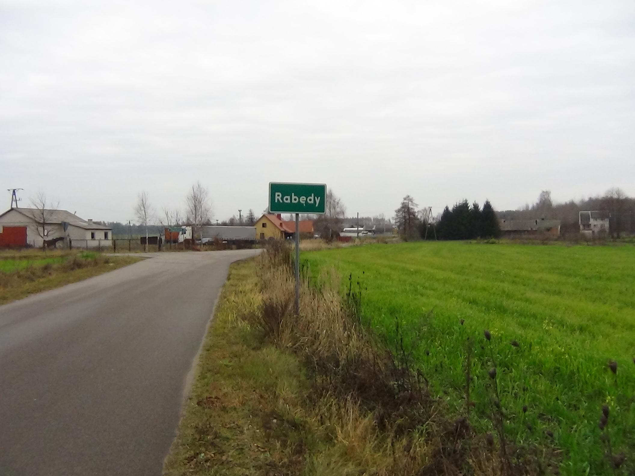 Widok od strony Jank Starych